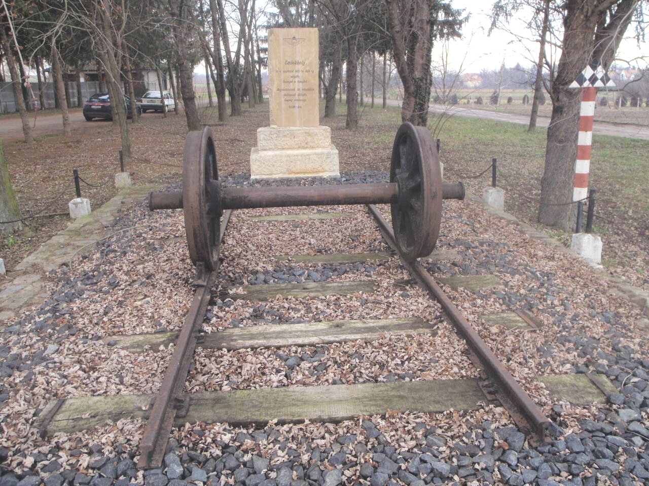 Denkmal in Csepreg für ehemalige Bahnstrecke Csepreg-Oberloisdorf, richtung Tömörd